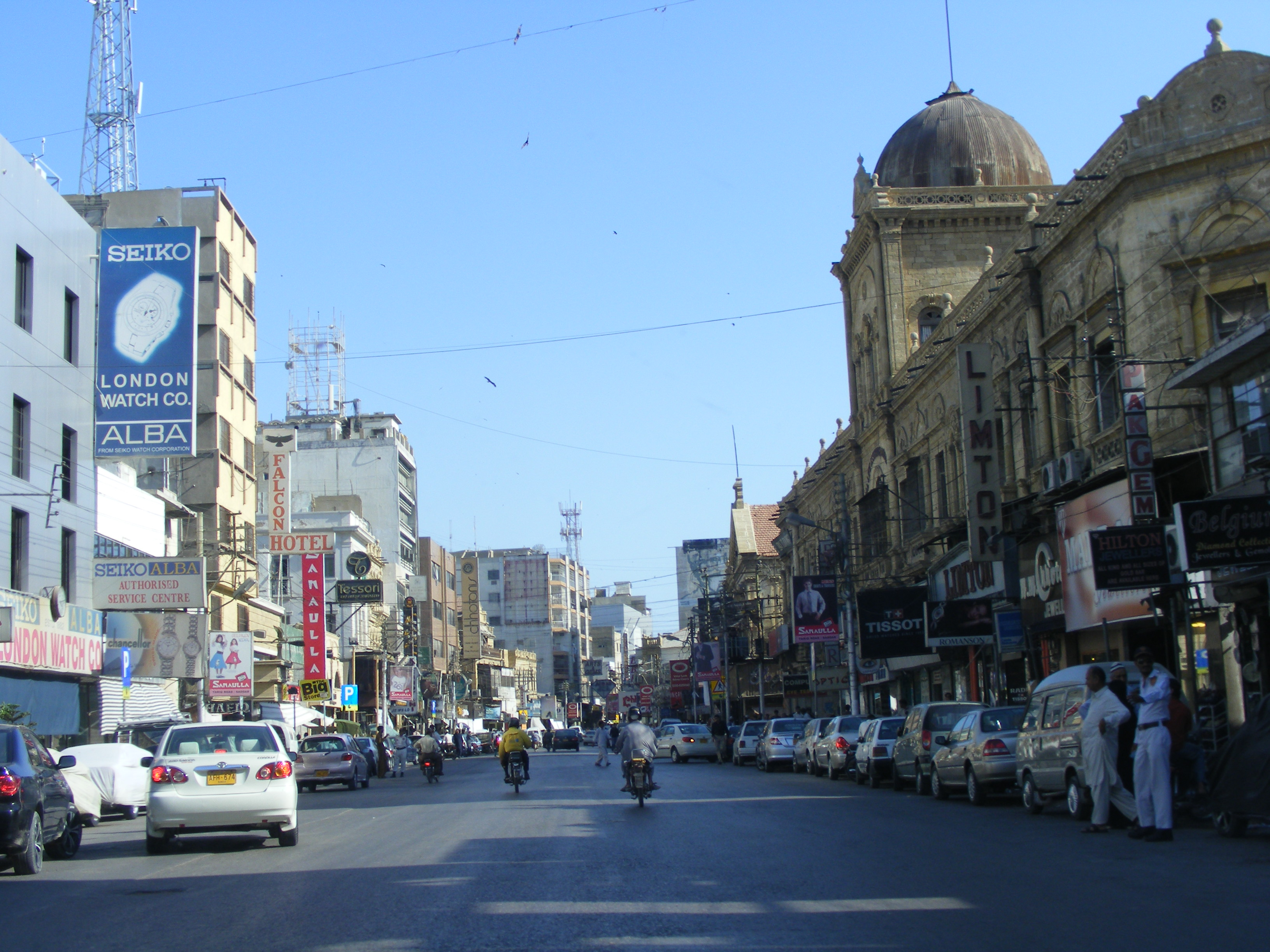 Saddar Town, Karachi, Pakistan